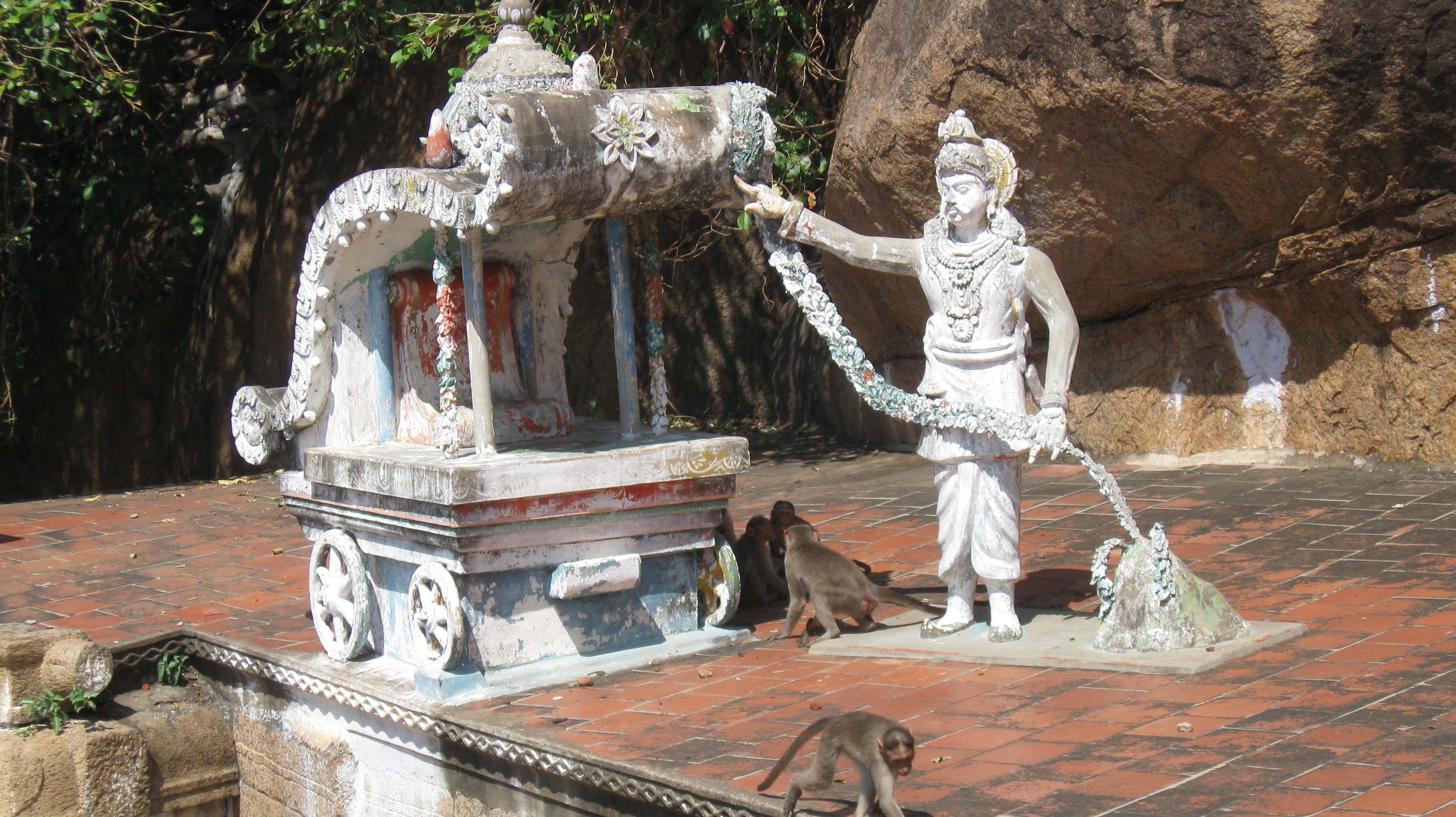 பறம்பு மலையில் காணப்படும் பாரி முல்லைக்குத் தேரீயும் சிலை வடிவக் காட்சி